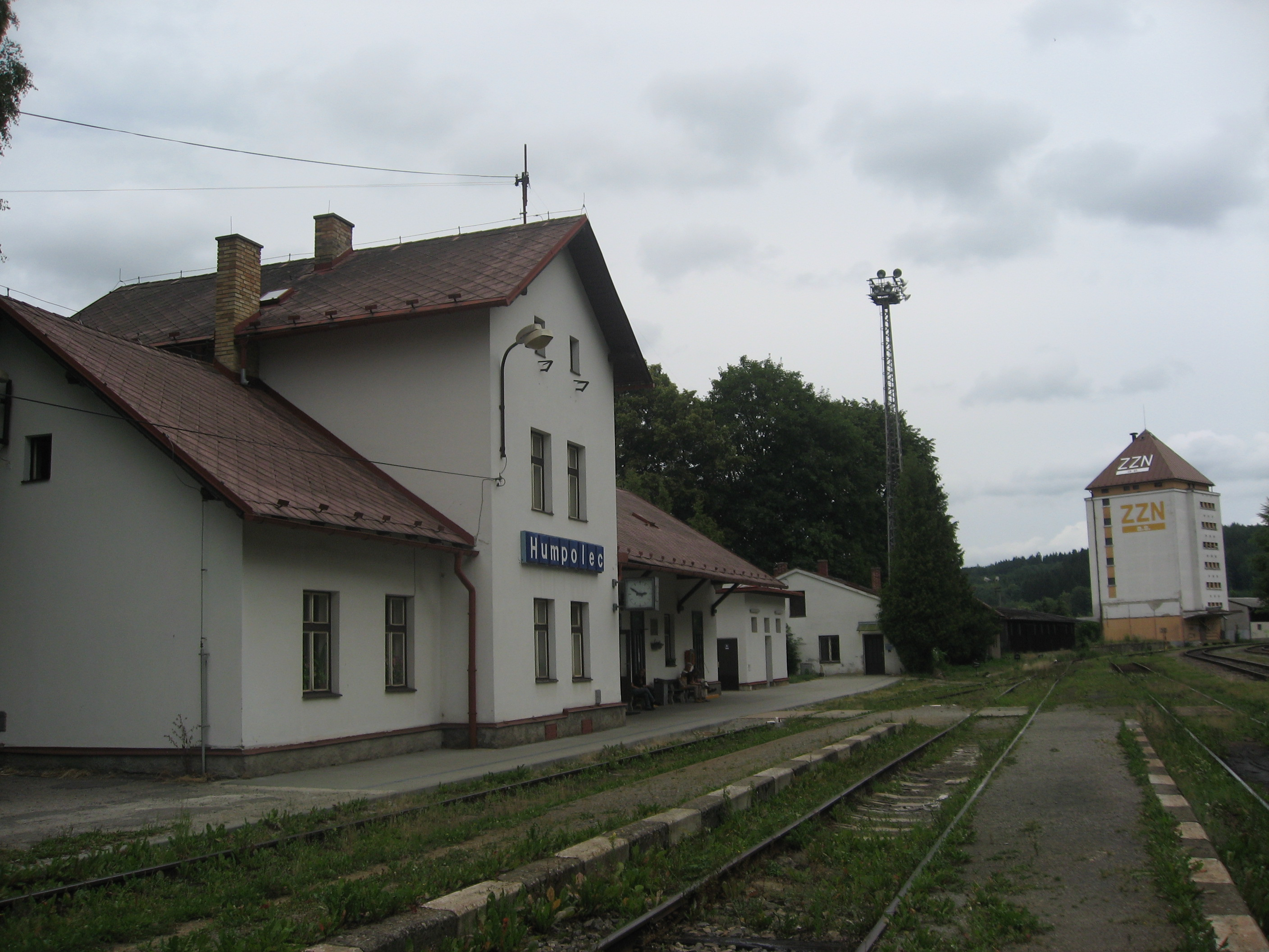 Humpolec, železniční nádraží